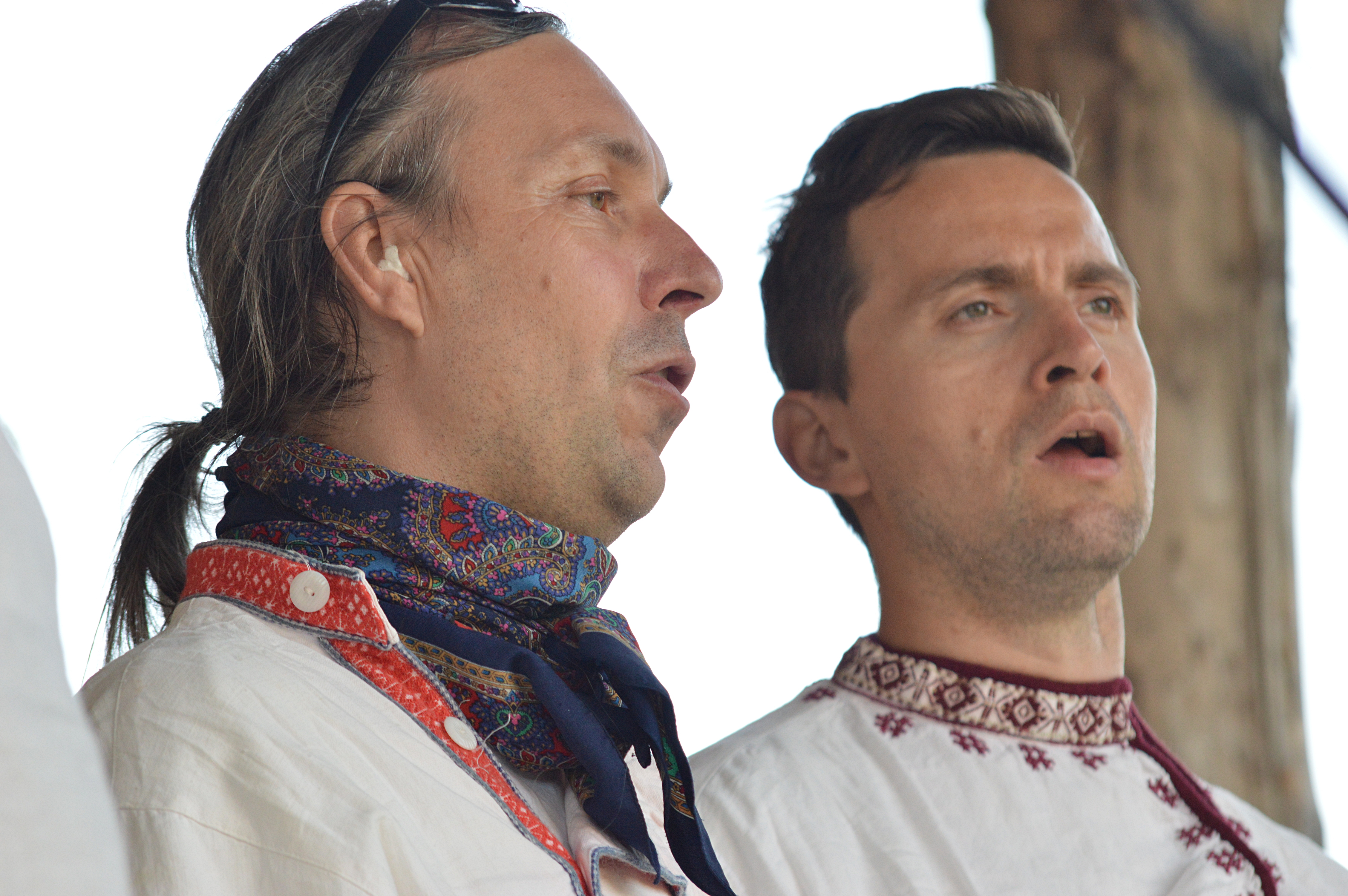 Lauri Sommer ja Andreas Kalkun, Liinatsuraq. Seto kultuuri festival Radajal.